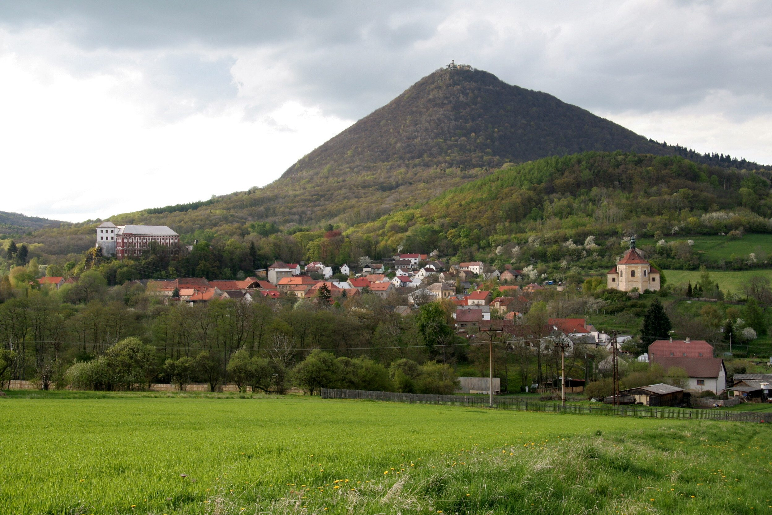 Pohled na ves Milešov (část obce Velemín) a horu Milešovku v Českém středohoří